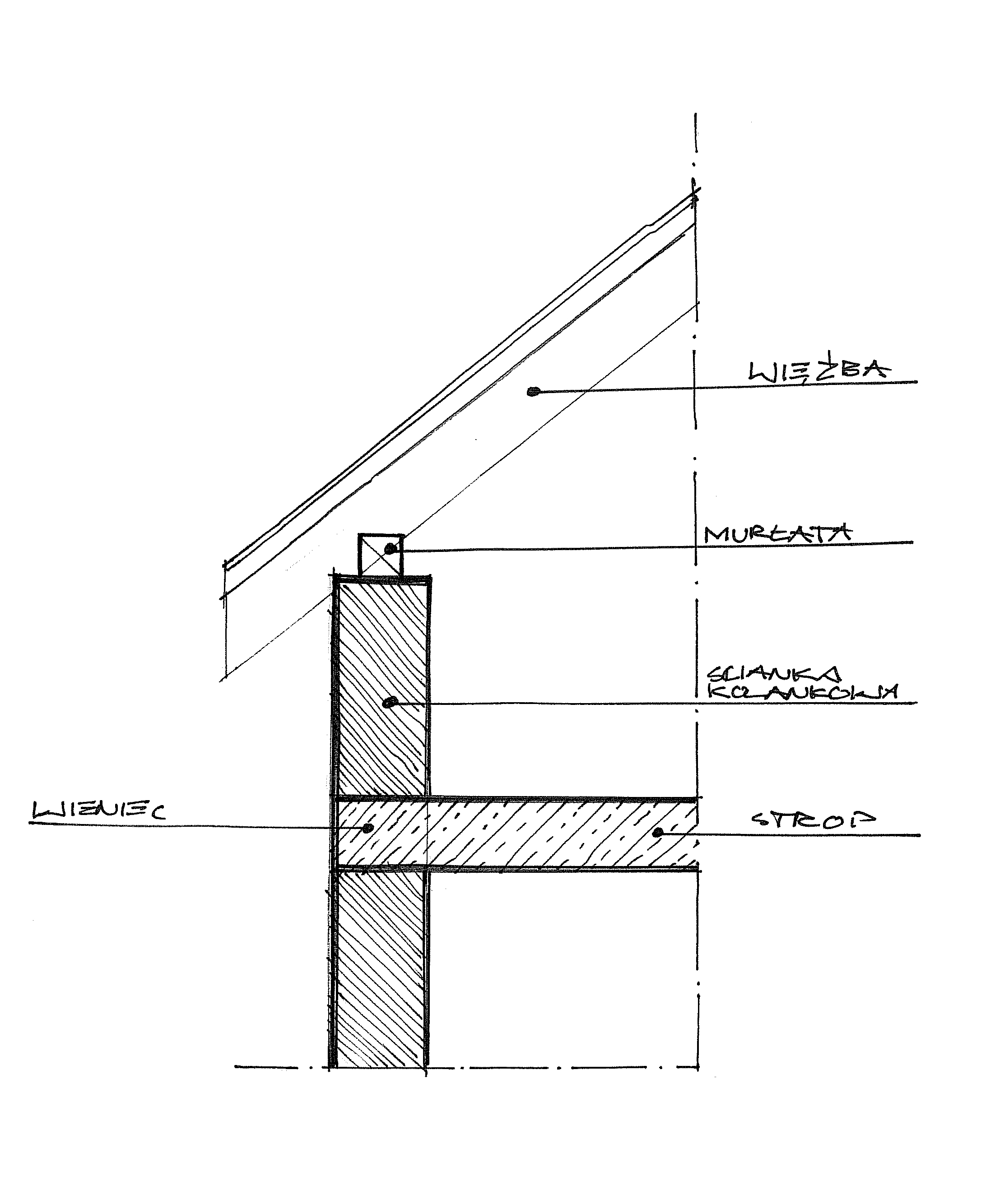 przekrój przez ściankę kolankową rysunek odręczny, Autor rysunku: Kontekstator